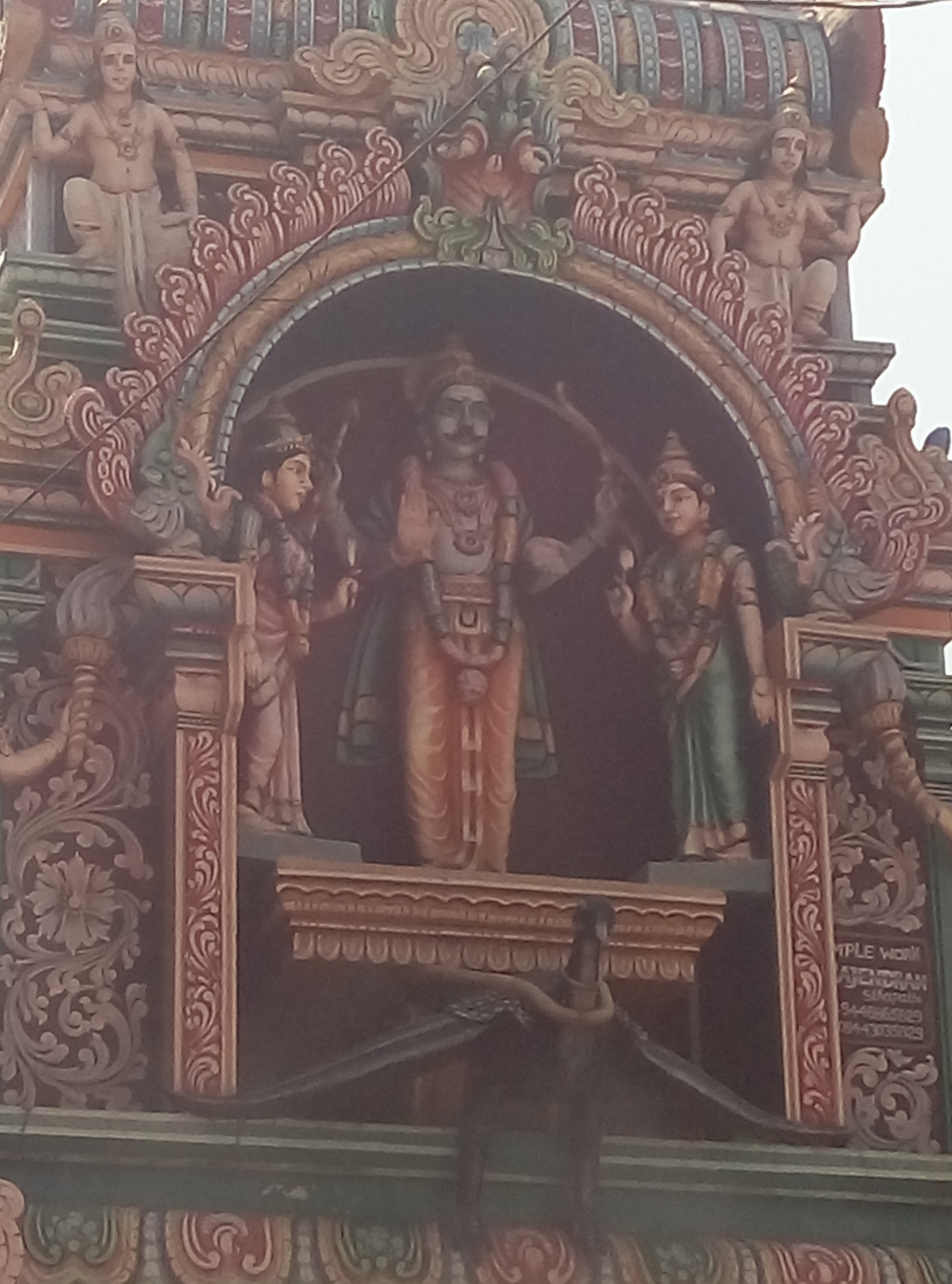 Shani Mahadev statue, Domlur, Bangalore